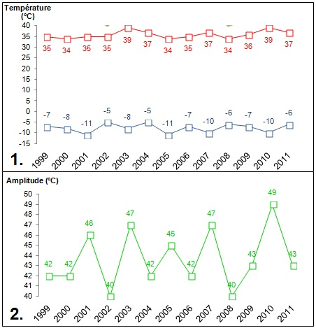 Amplitudes de températures Lannemezan